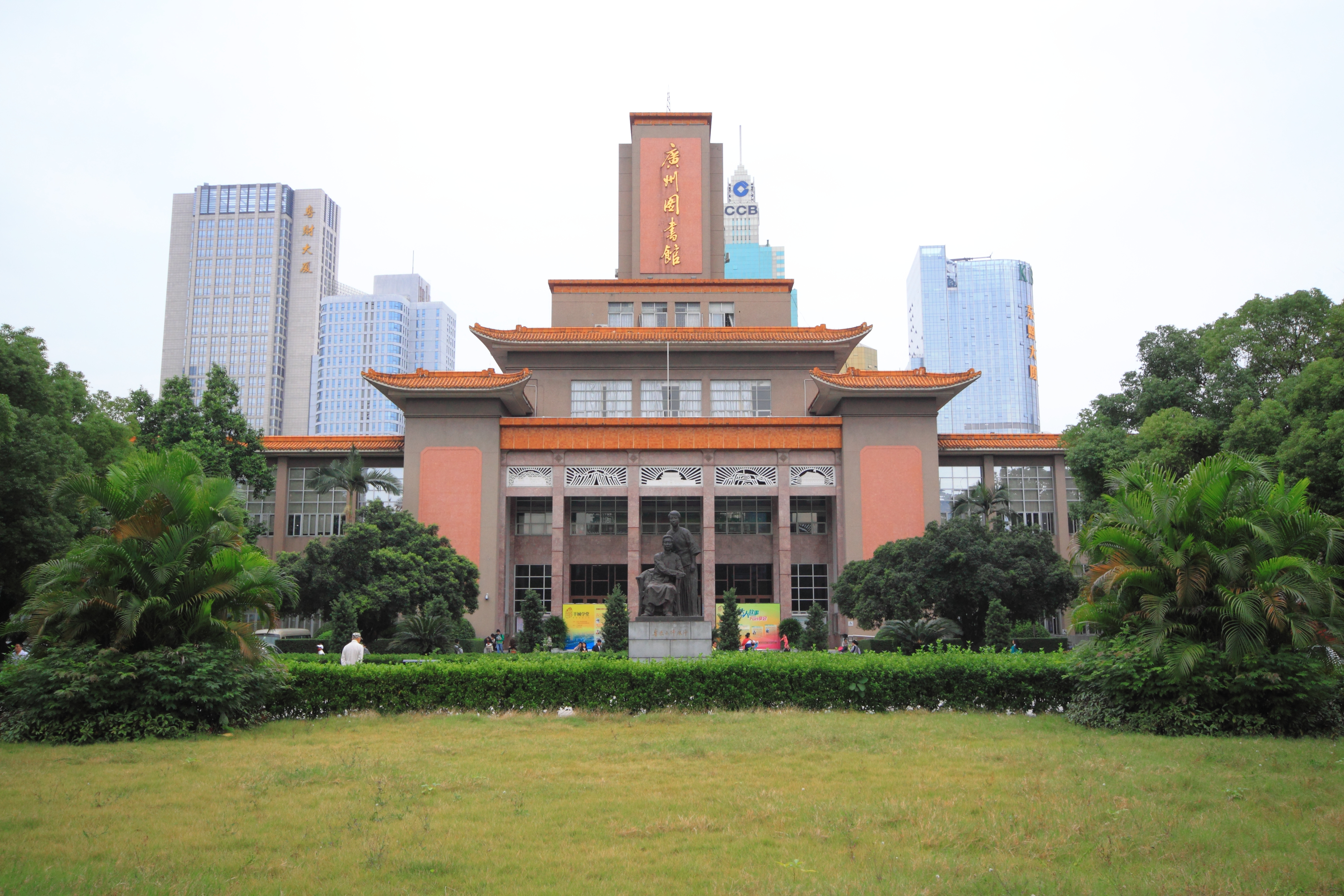 广州图书馆旧馆